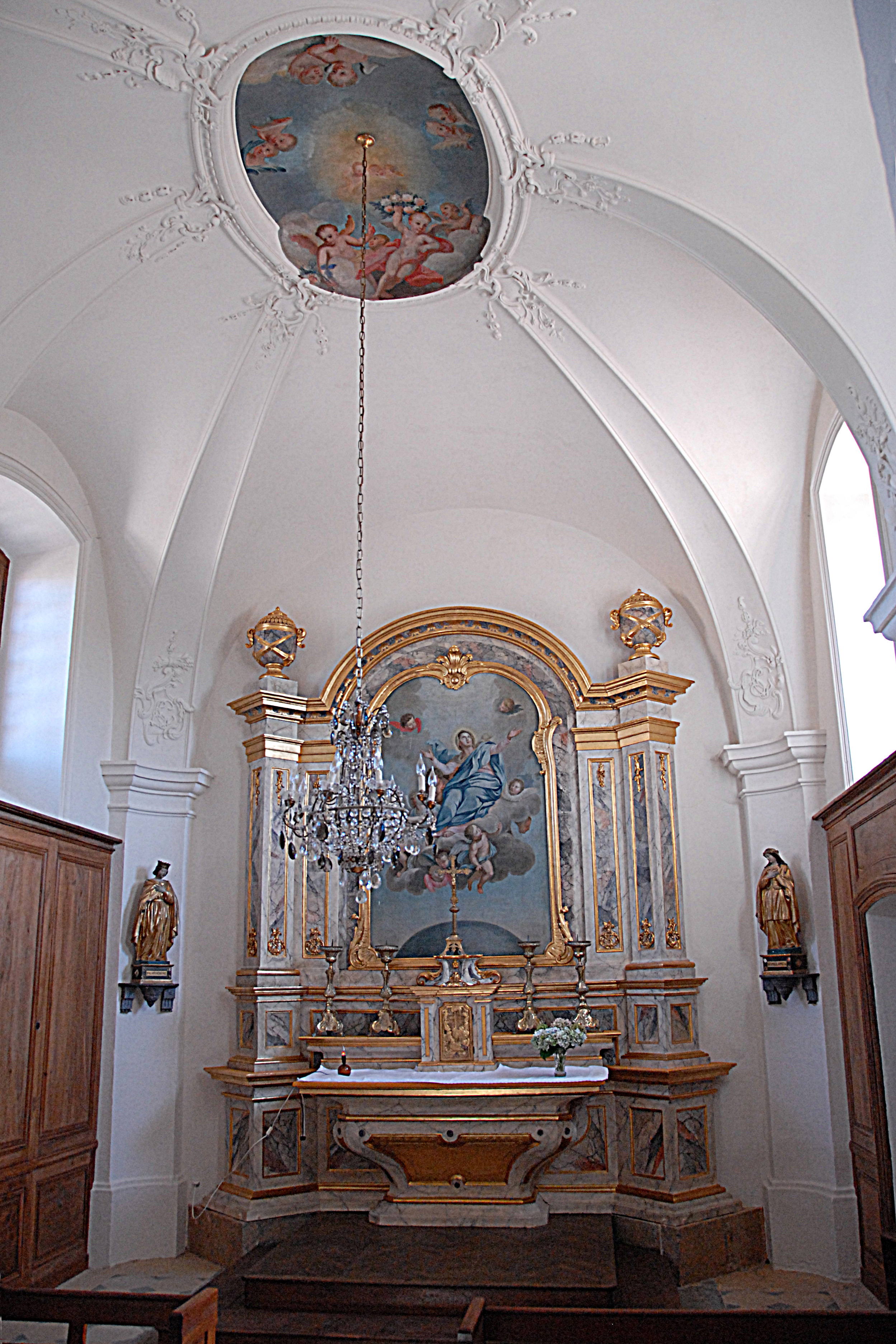 Sts-Pierre-et-Paul de Montceaux-l'Étoile, Grabkapelle